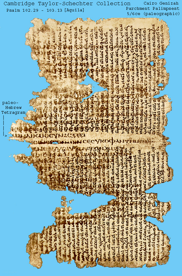 Απόσπασμα από τα Εξαπλά του Ωριγένη. Φαίνεται το Τετραγράμματο σε αρχαίους εβραϊκούς χαρακτήρες. (Με την παραχώρηση των δικαιωμάτων από [1])